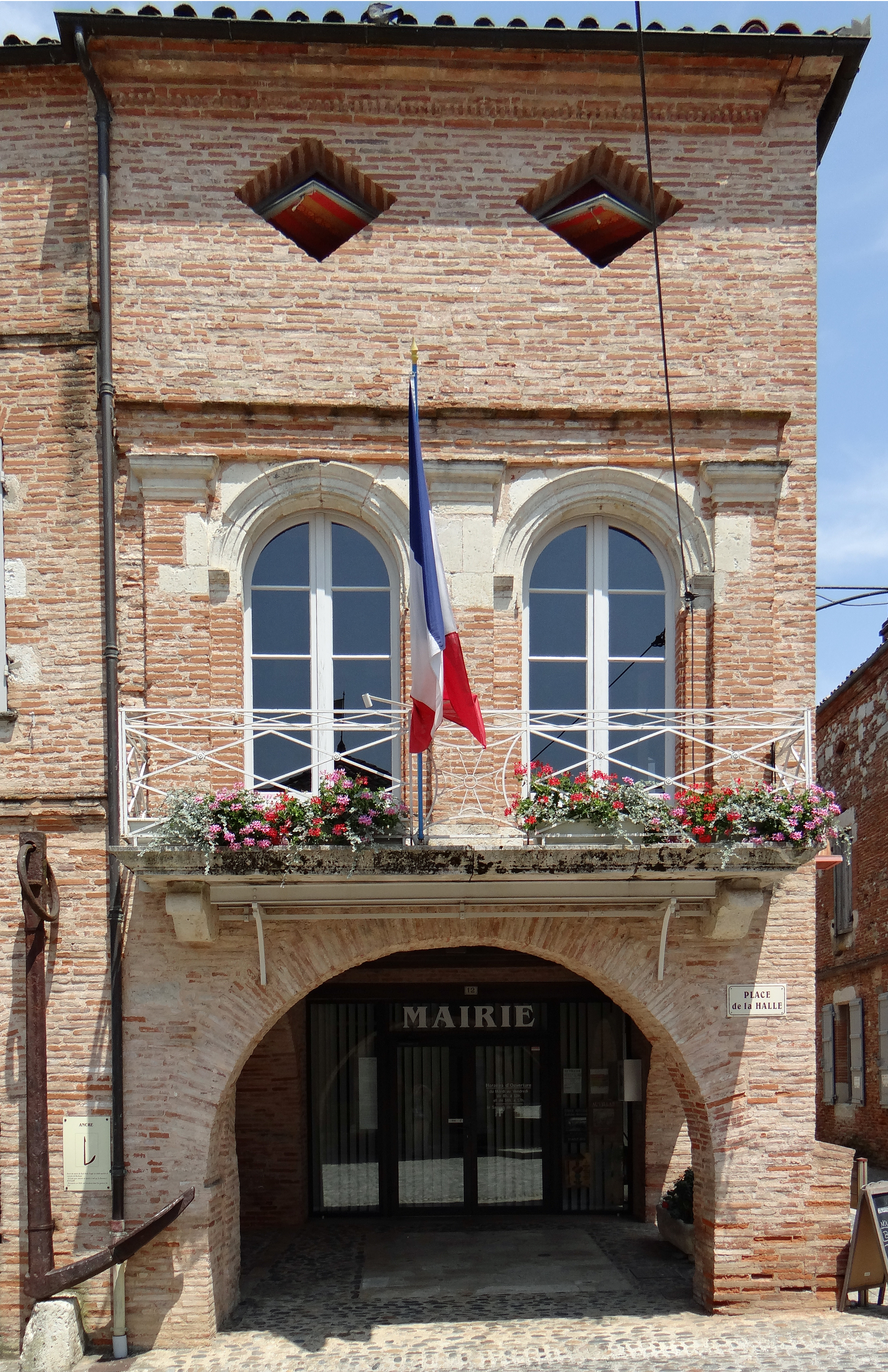 Auvillar - Place de la Halle-aux-Grains - La mairie, n°12